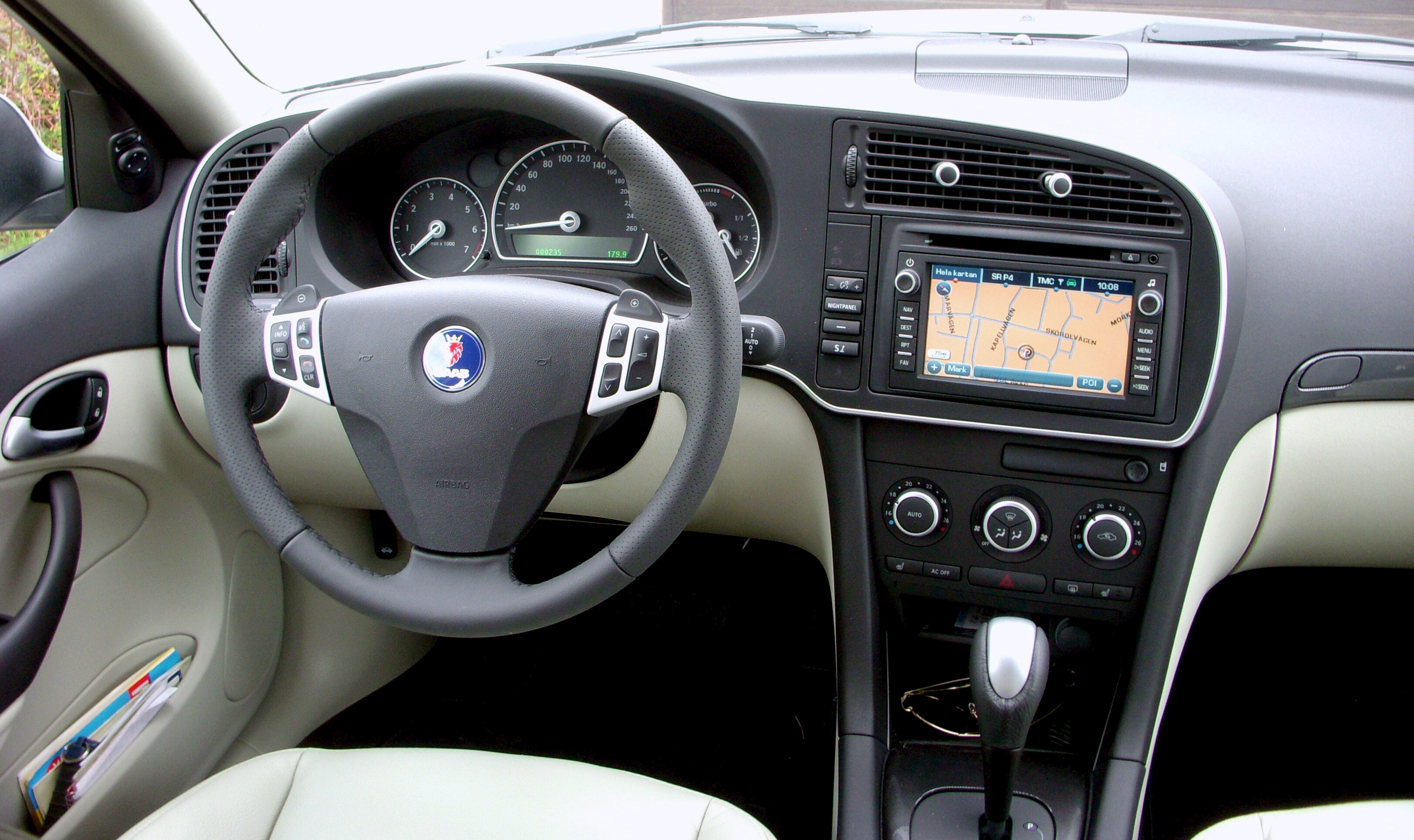 Saab 9-3x SportCombi förarplats